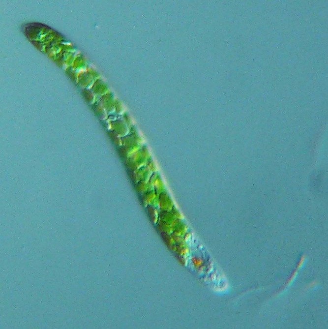 Euglena mutabilis - 400x - 1